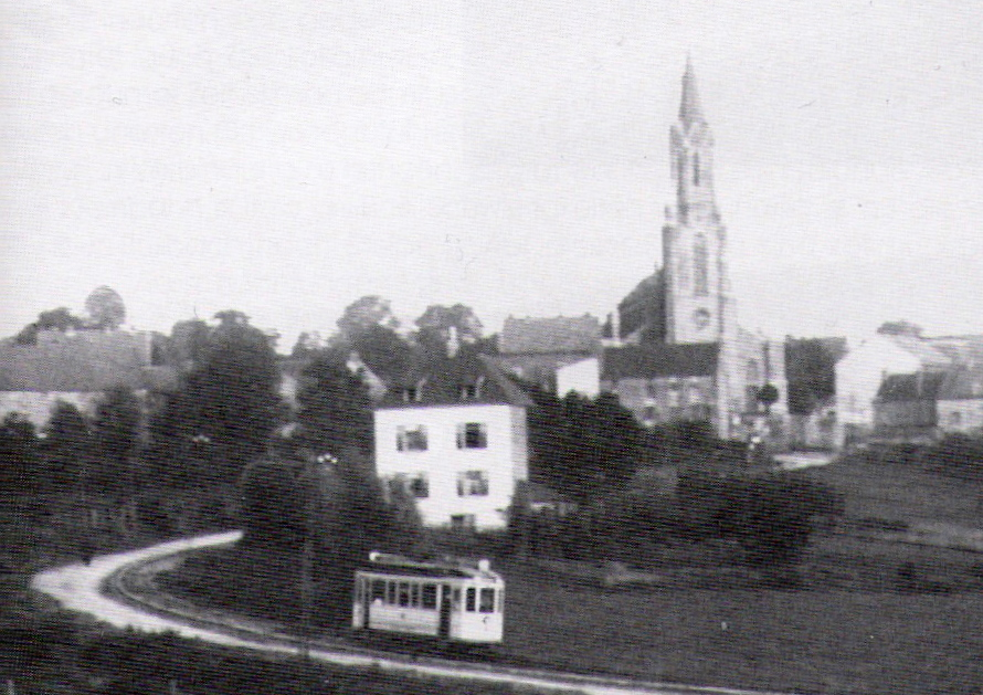 Büsbacher Kirche mit altem Kirchturm. Bild aus dem Jahre 1903